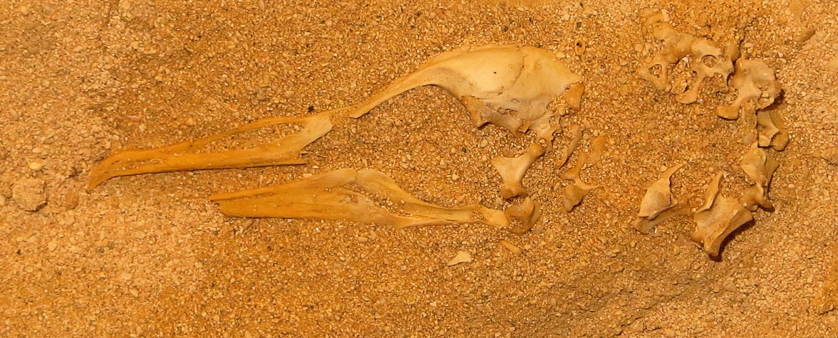 Fossil of Puffinus, an extinct bird- Took the picture at Museo de la Naturaleza y el Hombre - Tenerife